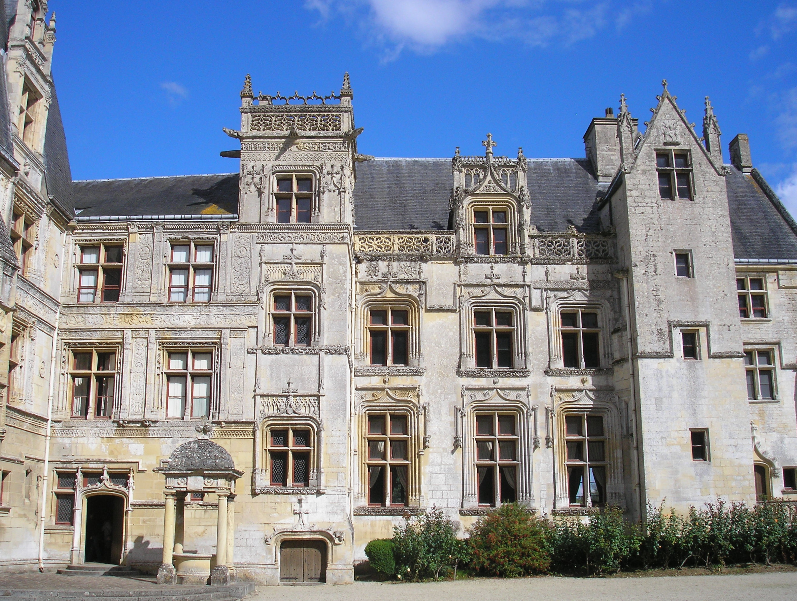 Fontaine-Henry (Normandie, France). Façade Renaissance du château.